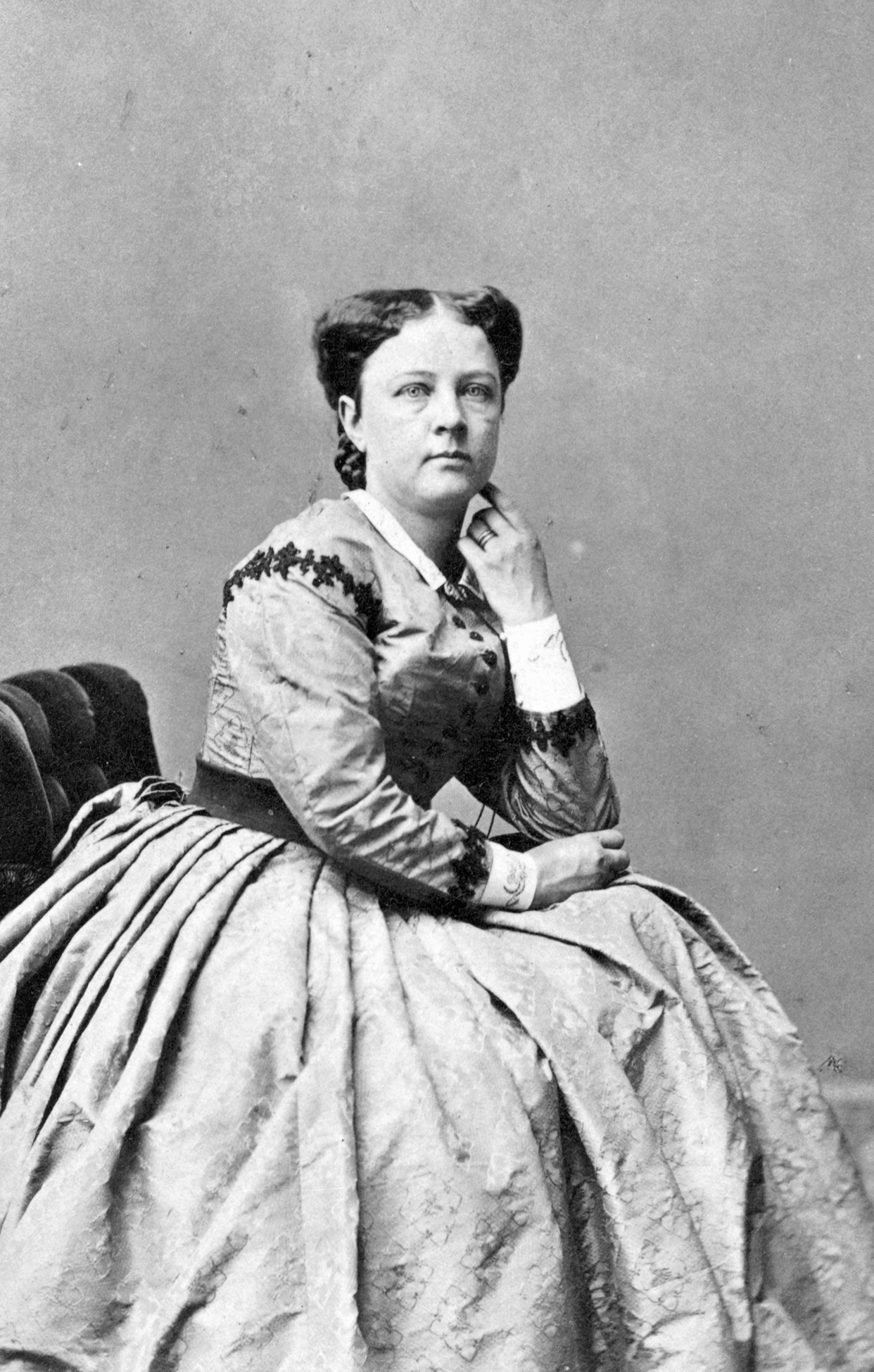 Mathilda Thorell, skådespelare vid Södra teatern 1862